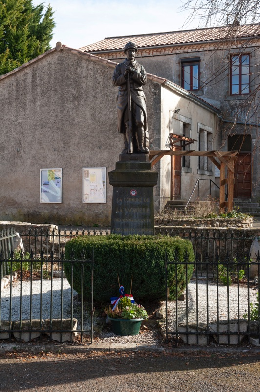 Monument aux morts - Archives départementales de l’Hérault - FRAD034-2458W-La-Vacquerie-00001